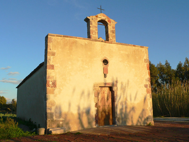 Giba - Chiesa di Santa Marta